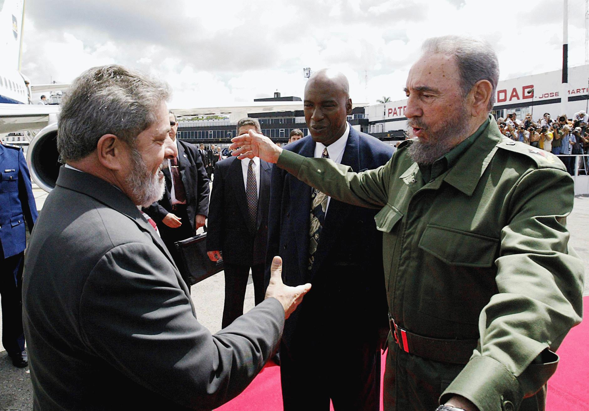 O líder cubano Fidel Castro.